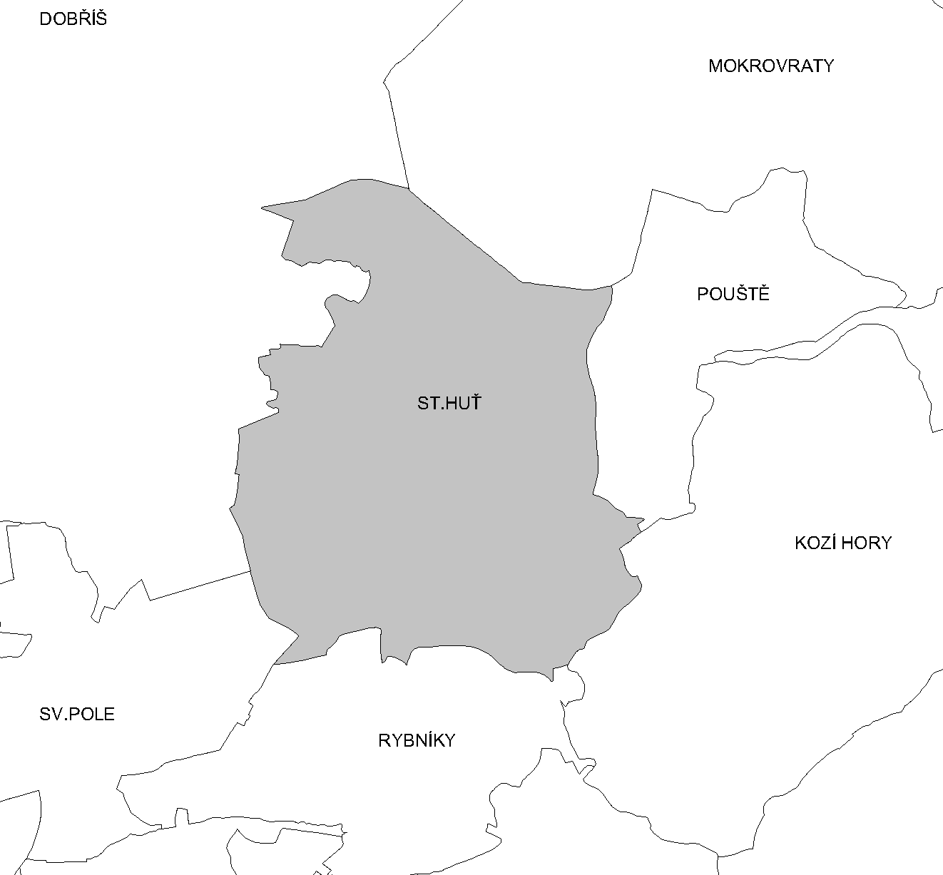 Katastr Staré Hutě